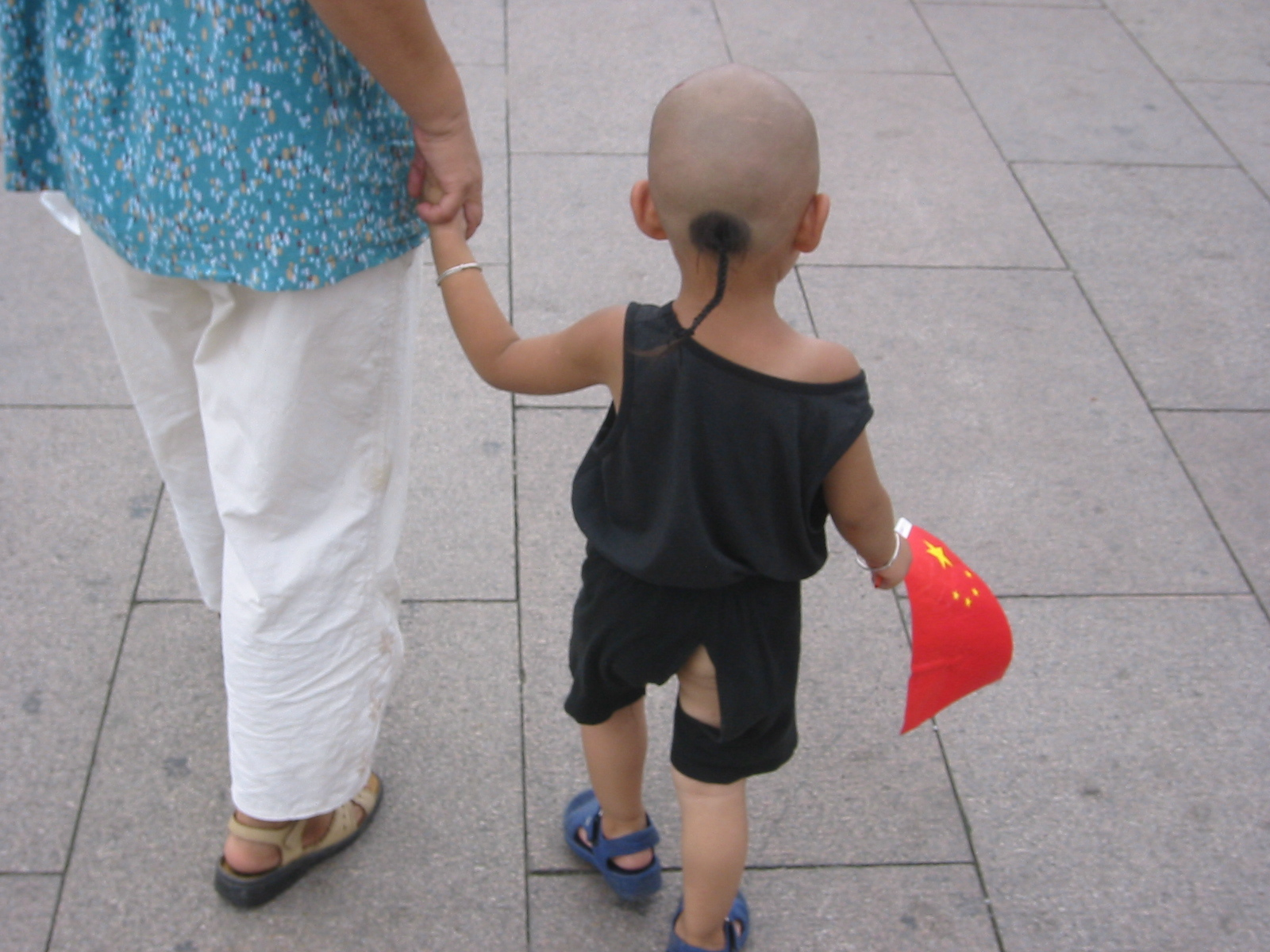 Strassenszene in Shanghai, Kind mit belüfteter Hose, zum bequemeren ....